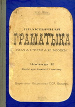 Okładka książki "Praktycznaja hramatyka biełaruskaje mowy 2" autorstwa Jazepa Losika.